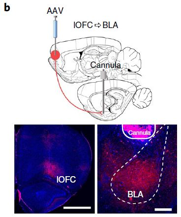 DREADDの模式図